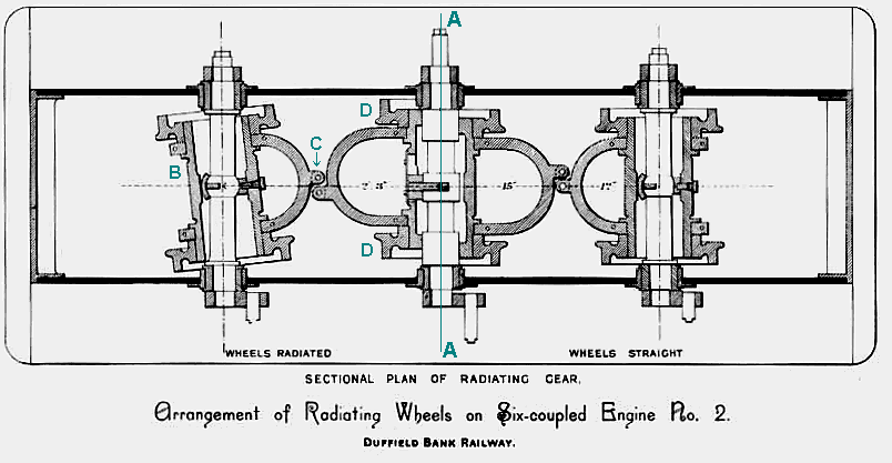 The Axlre Arrangement of the Heywood Radiating Axle Locomotive